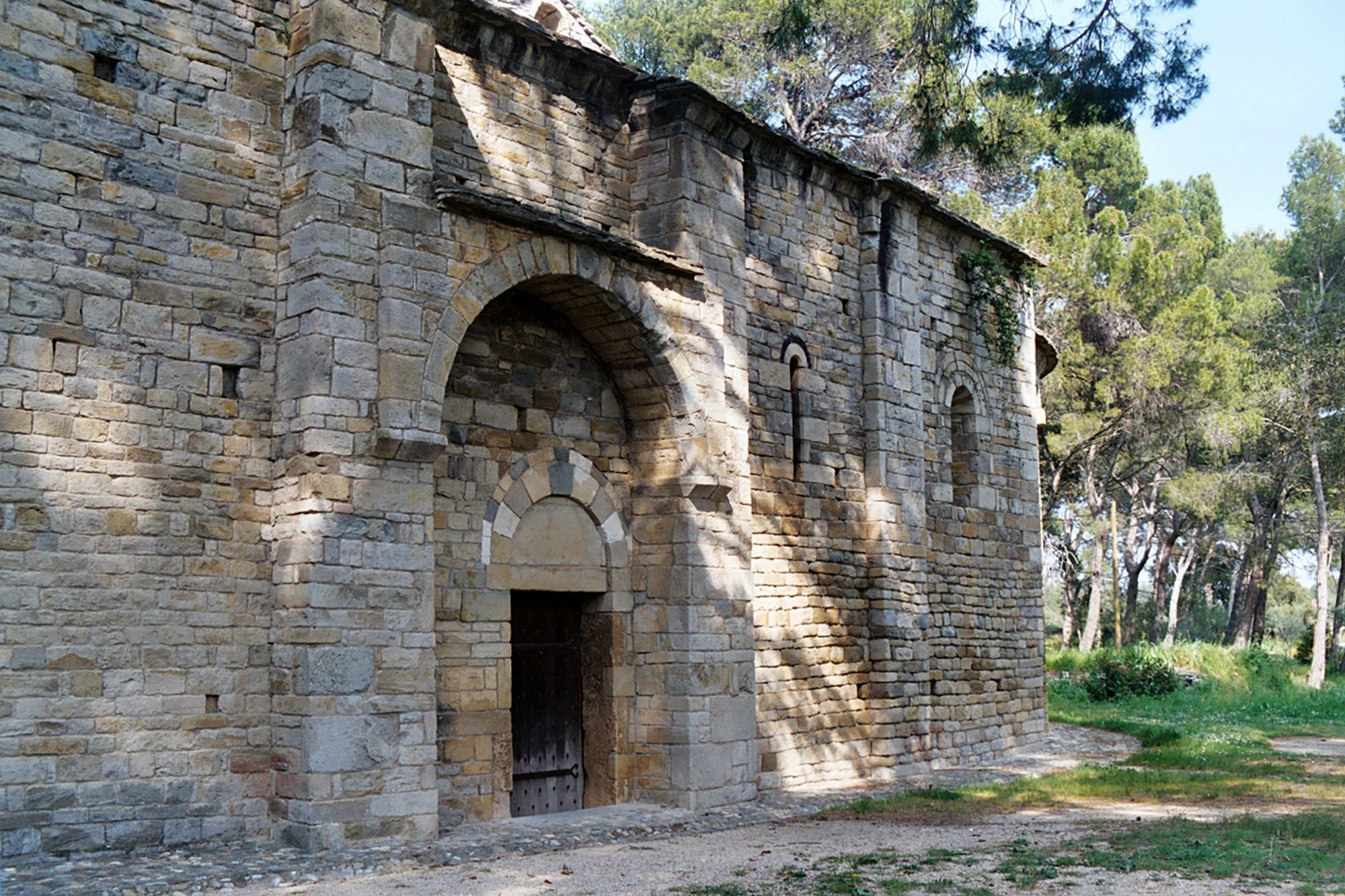 France - Languedoc - Hérault - Chapelle Saint-Germain de Cesseras